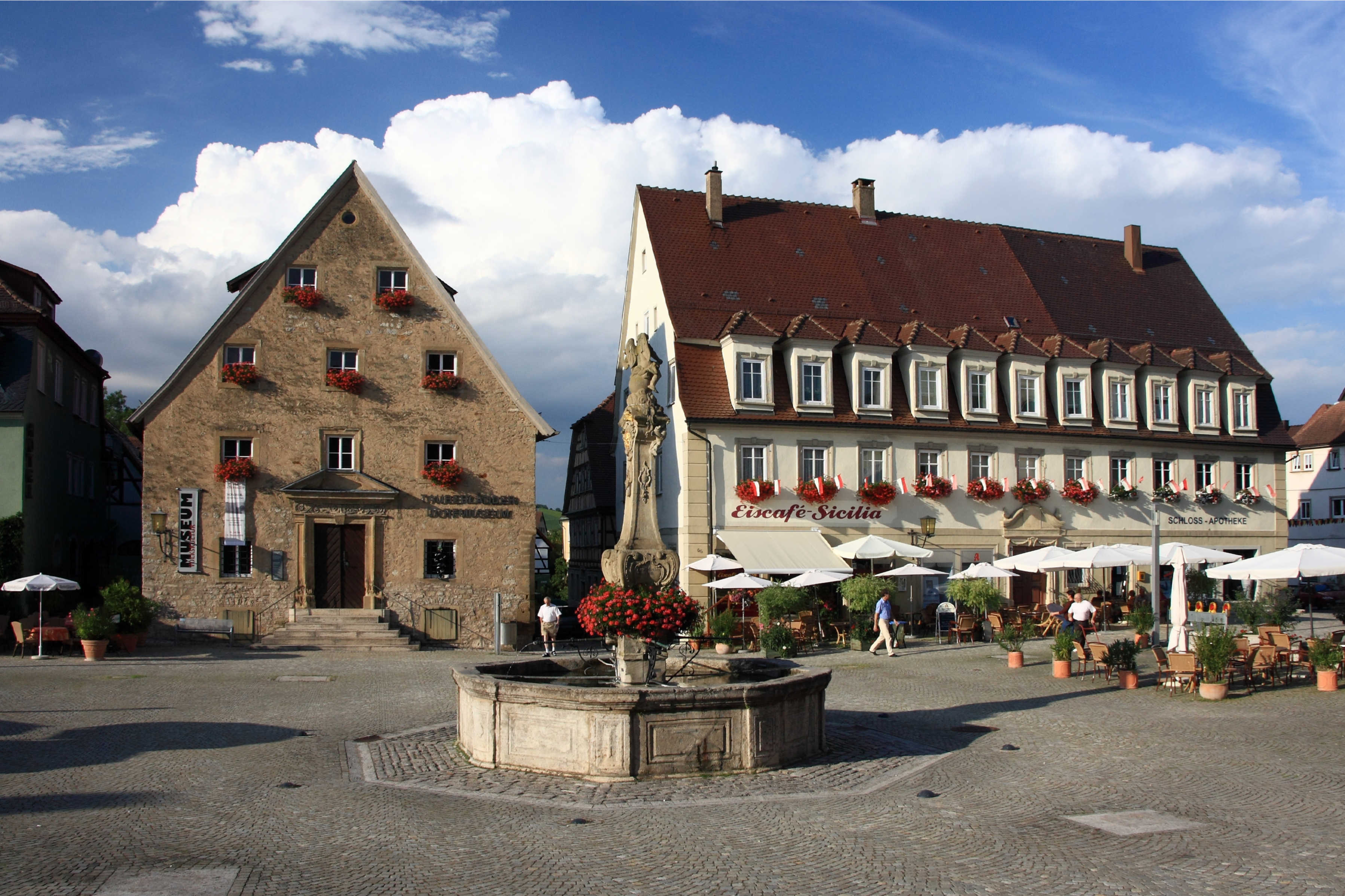 Marktplatz 8 (links): Heute das Tauberländer Dorfmuseum. Ehemaliger Fruchtkasten und Keller. Fachwerkbau mit rundem Kellerbogen. Massive Vorderfront mit Schmuckportal von 1712. Marktplatz 2 - 6 (rechts): Putzbau mit Mansardendach und reichem Portal. Eingemauerter Wappenstein aus dem 16. Jh. 1784 neu errichtet. Im Vordergrund der Marktbrunnen mit reichem Skulpturenschmuck von 1767.